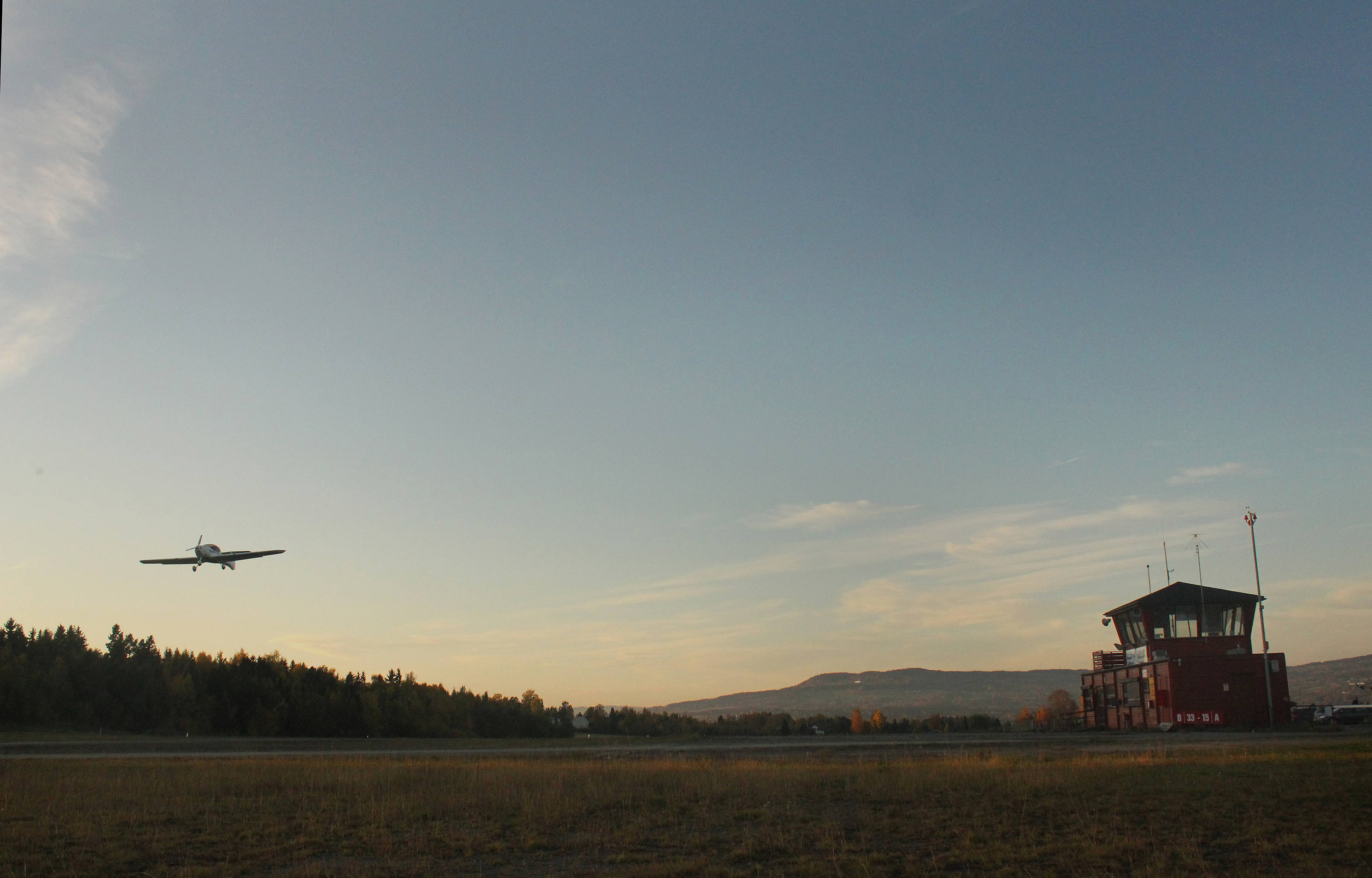 Med en 600 meter lang flystripe, har fly kommet og gått her siden 1950. Blant annet har Hedmark Flyklubb og HAGL Fallskjermklubb tilholdssted her.